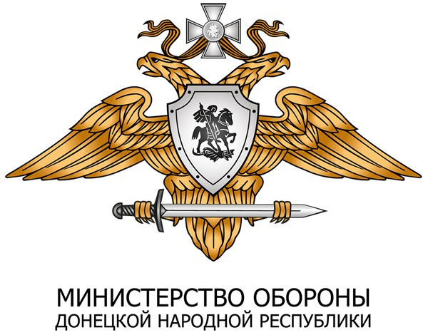 Герб